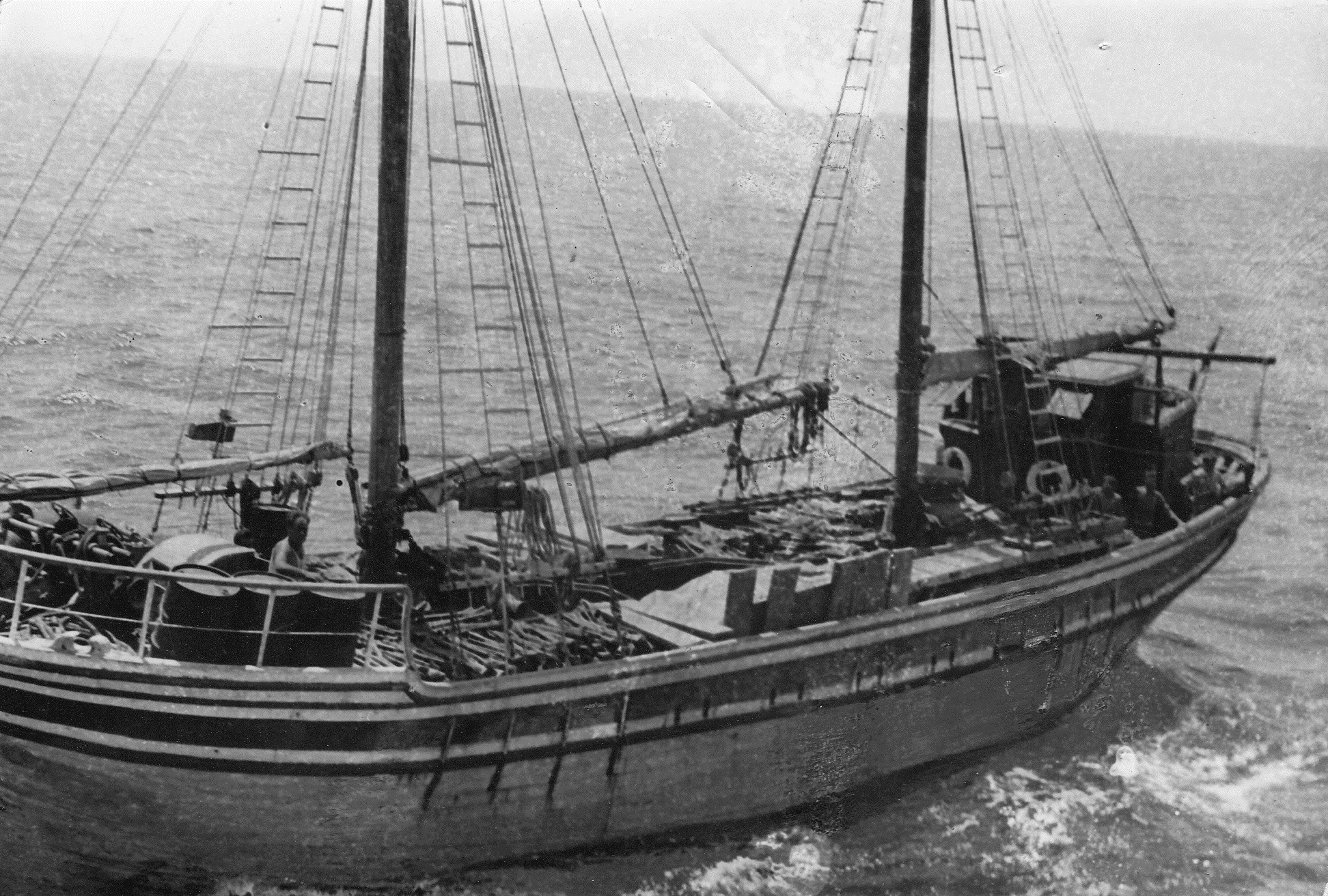 ספינת הנשק לערבים ארג'ירו בעת תפישתה